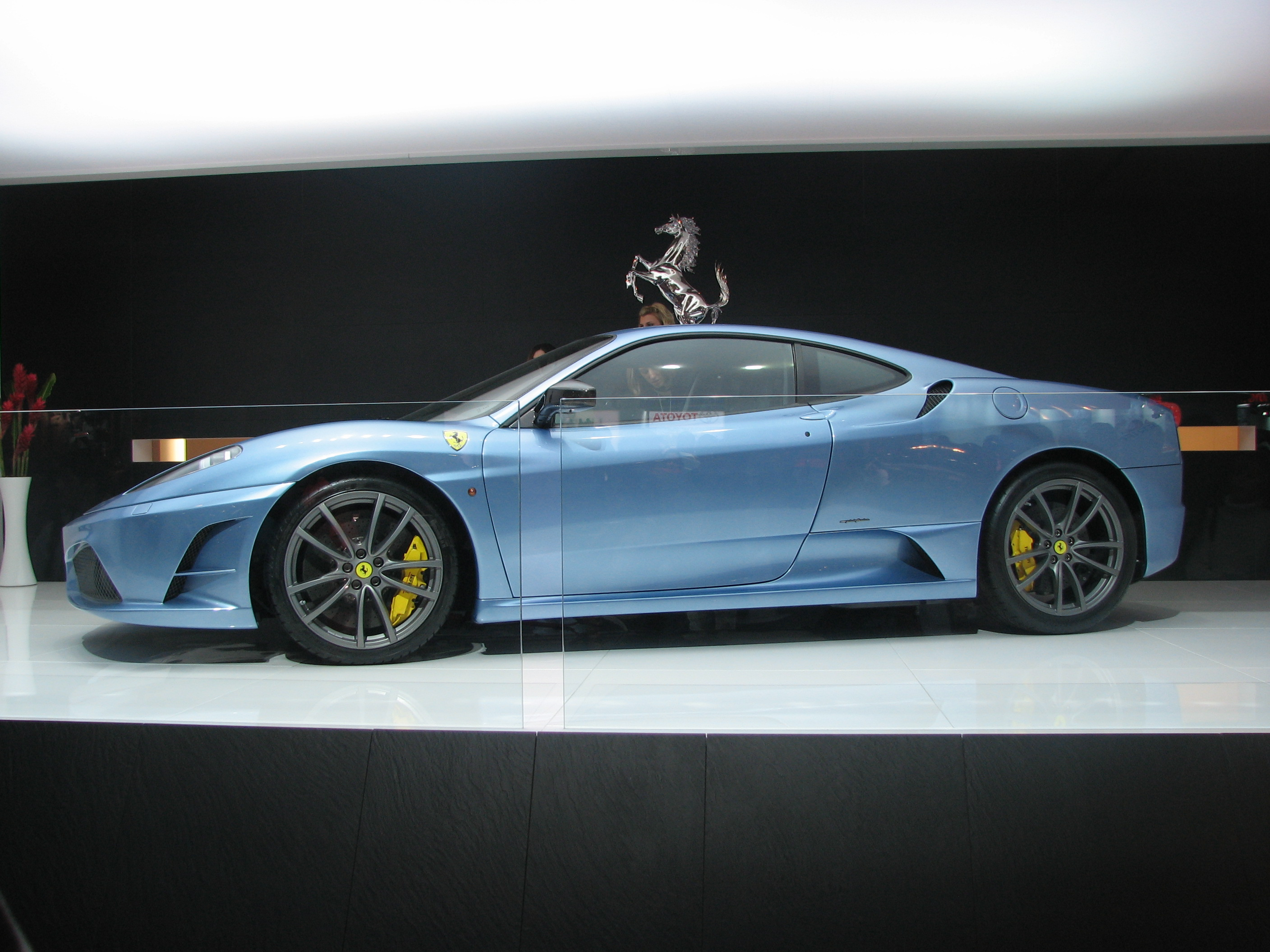 Ferrari 430 Scuderia at NAIAS 08